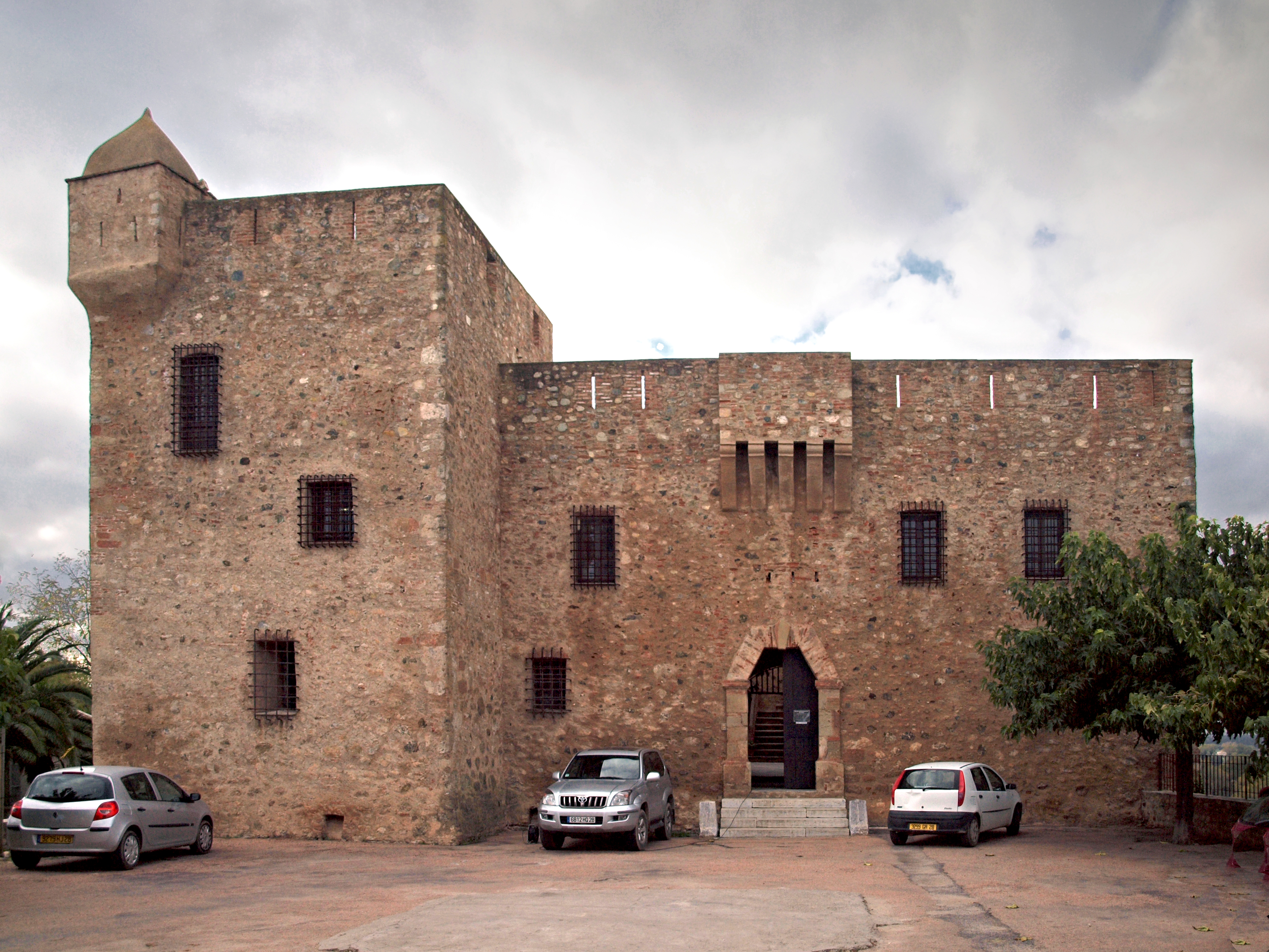 Aléria (Corsica) - Le fort d'Aléria